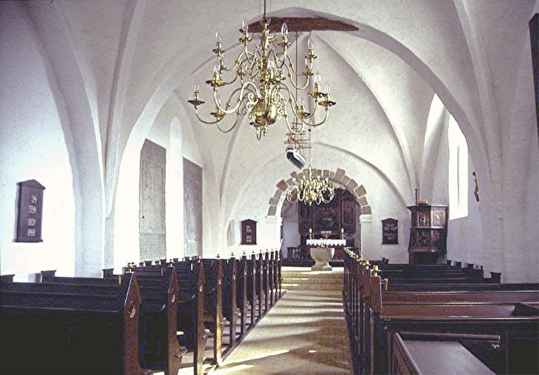 Sønderholm Kirke i Danmark. Skibet set mod øst